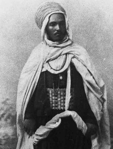 Photo officiel du Jilali Ben Driss Zerhouni, alias Bou Hamara